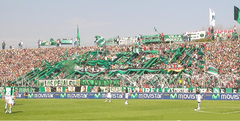 Estadio Nueva Chicago en el barrio de Mataderos, Ciudad de Buenos Aires, Argentina.